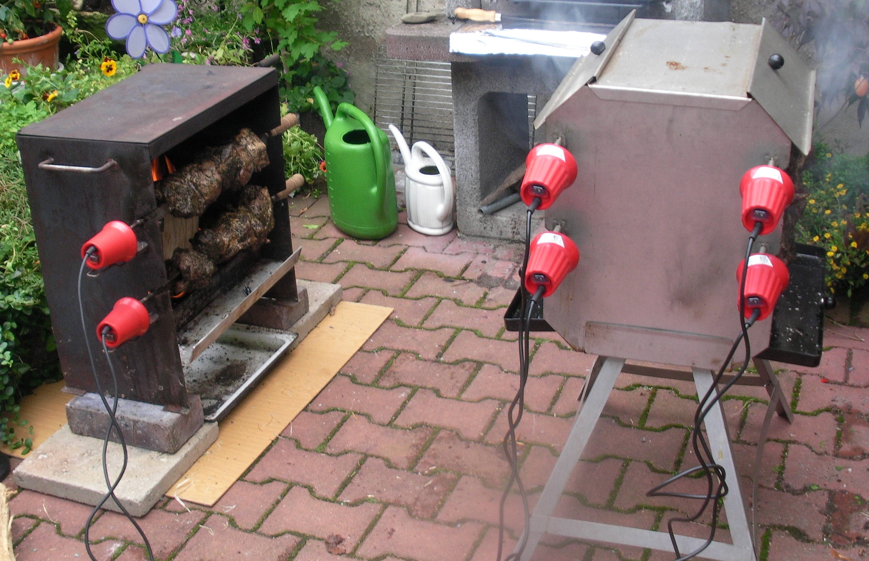 Mutzbratenstand - Selbstbau (links) und industriell gefertigt (rechts)